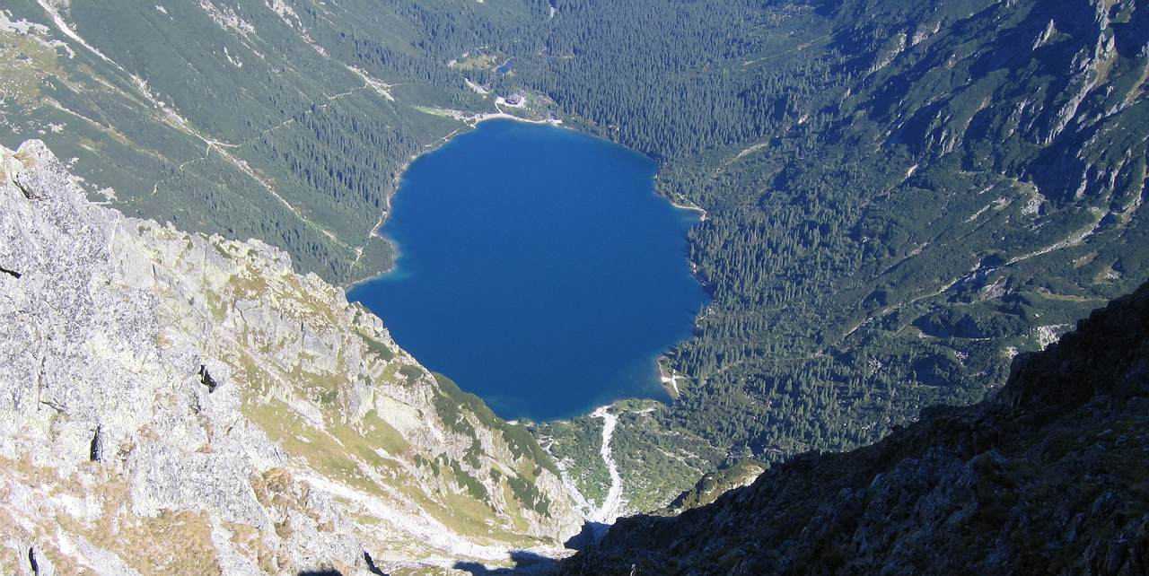 Przełęcz pod Chopkiem. Widok na Morskie Oko.